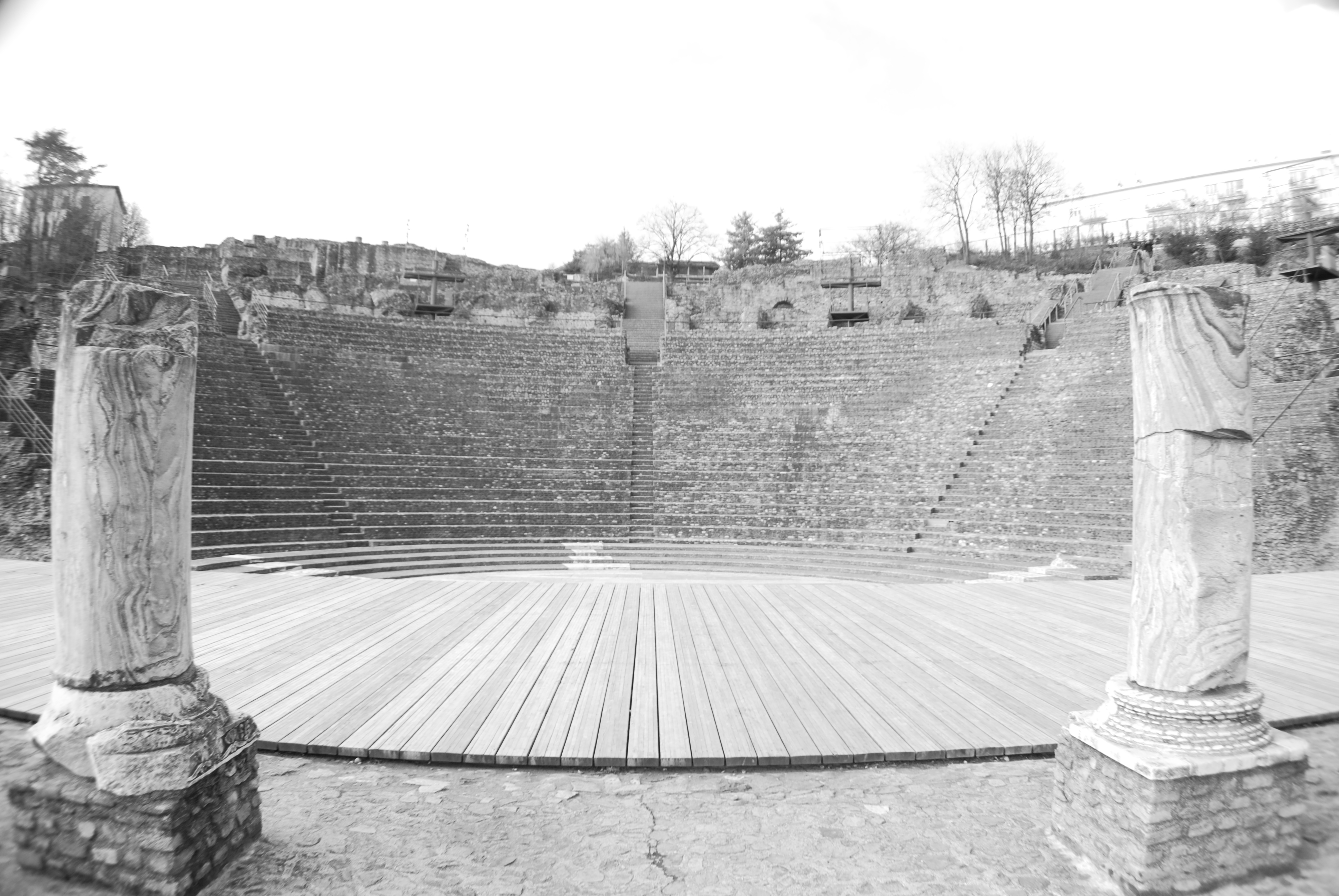 Théâtre antique gallo-romain